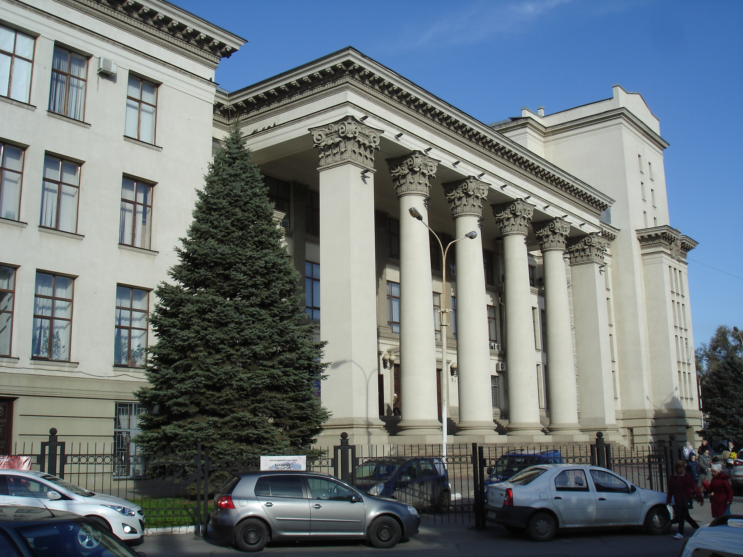 Лендворец, вид 1